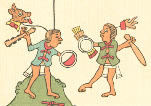 Cuahuitl del Codice Telleriano